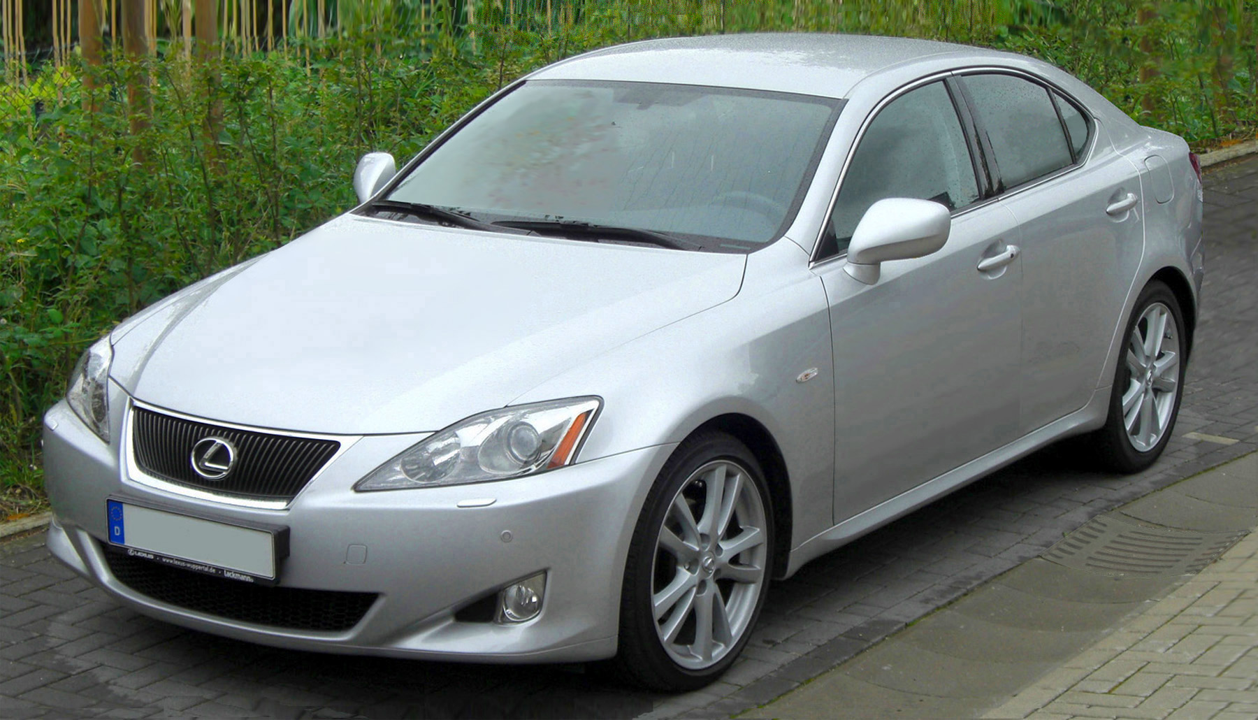 Lexus IS250